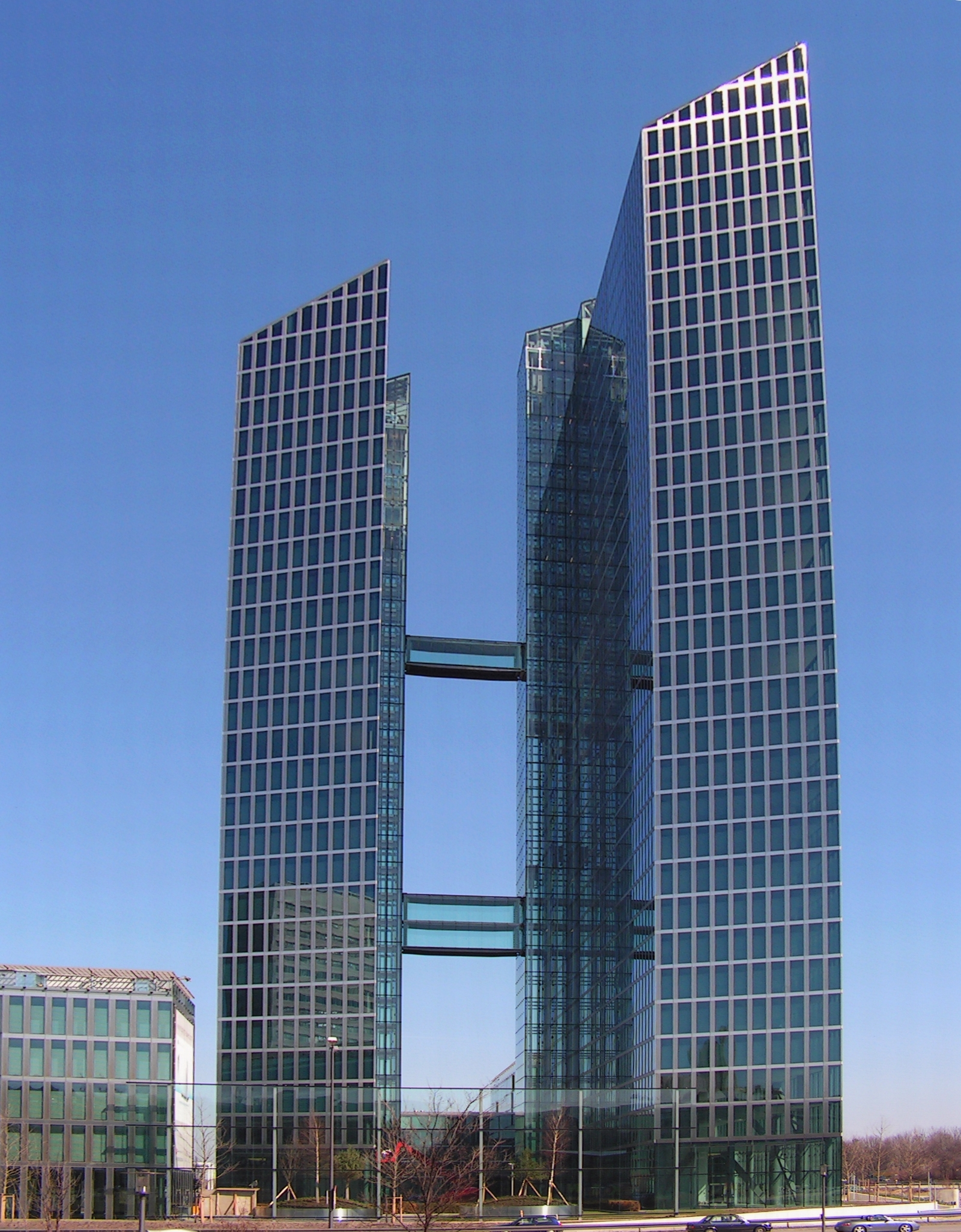 Die Highlight Towers in München an der Mies-van-der-Rohe-Straße bzw. an der Walter-Gropius-Straße gelegen, fertiggestellt 2004, nach einem Entwurf des Architekten Helmut Jahn (Murphy/Jahn Architects, Chicago) - Foto Wolfgang Pehlemann Steinberg/Ostsee PICT0032